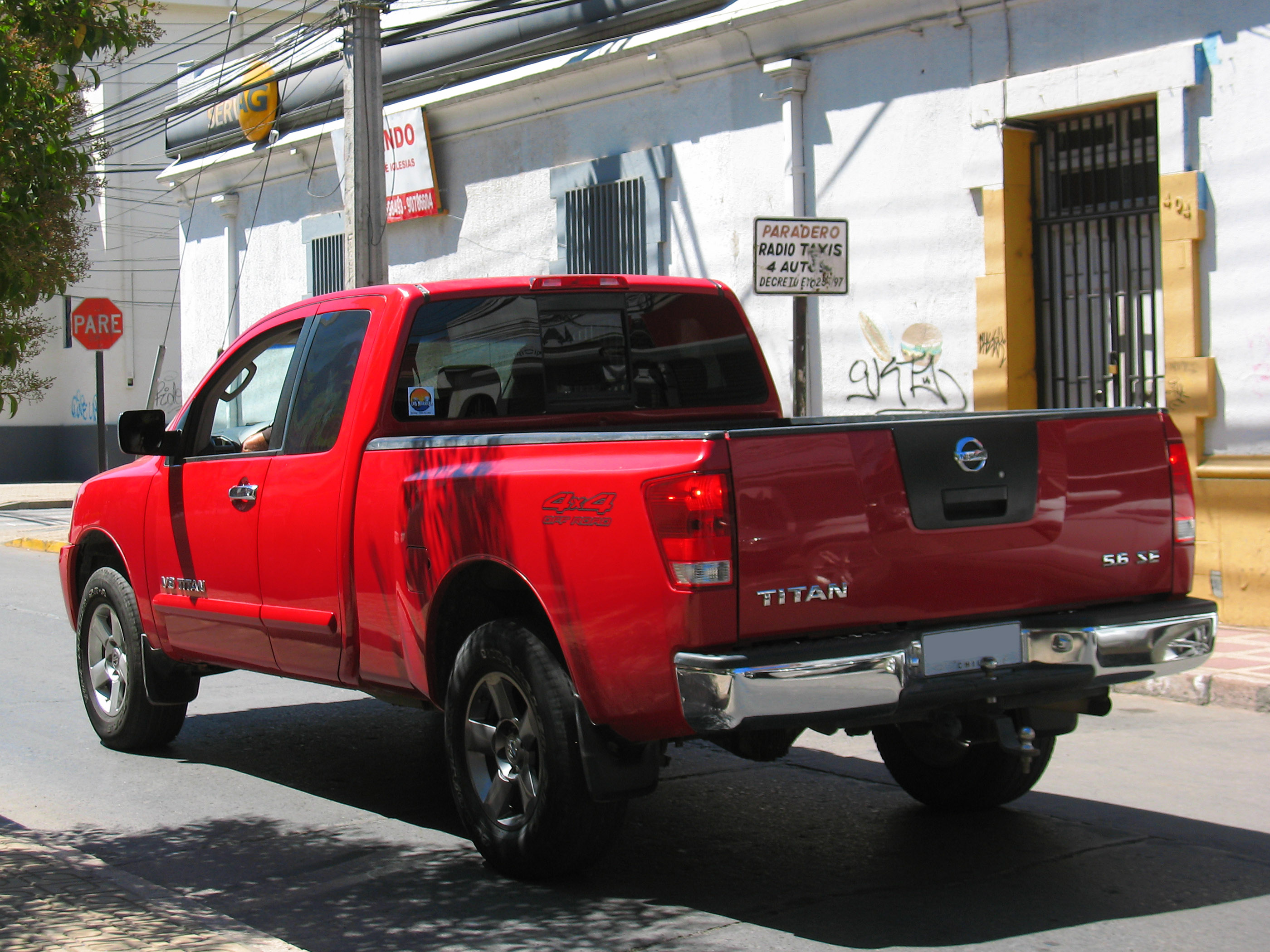 Nissan Titan V8 SE King Cab 4x4 2007